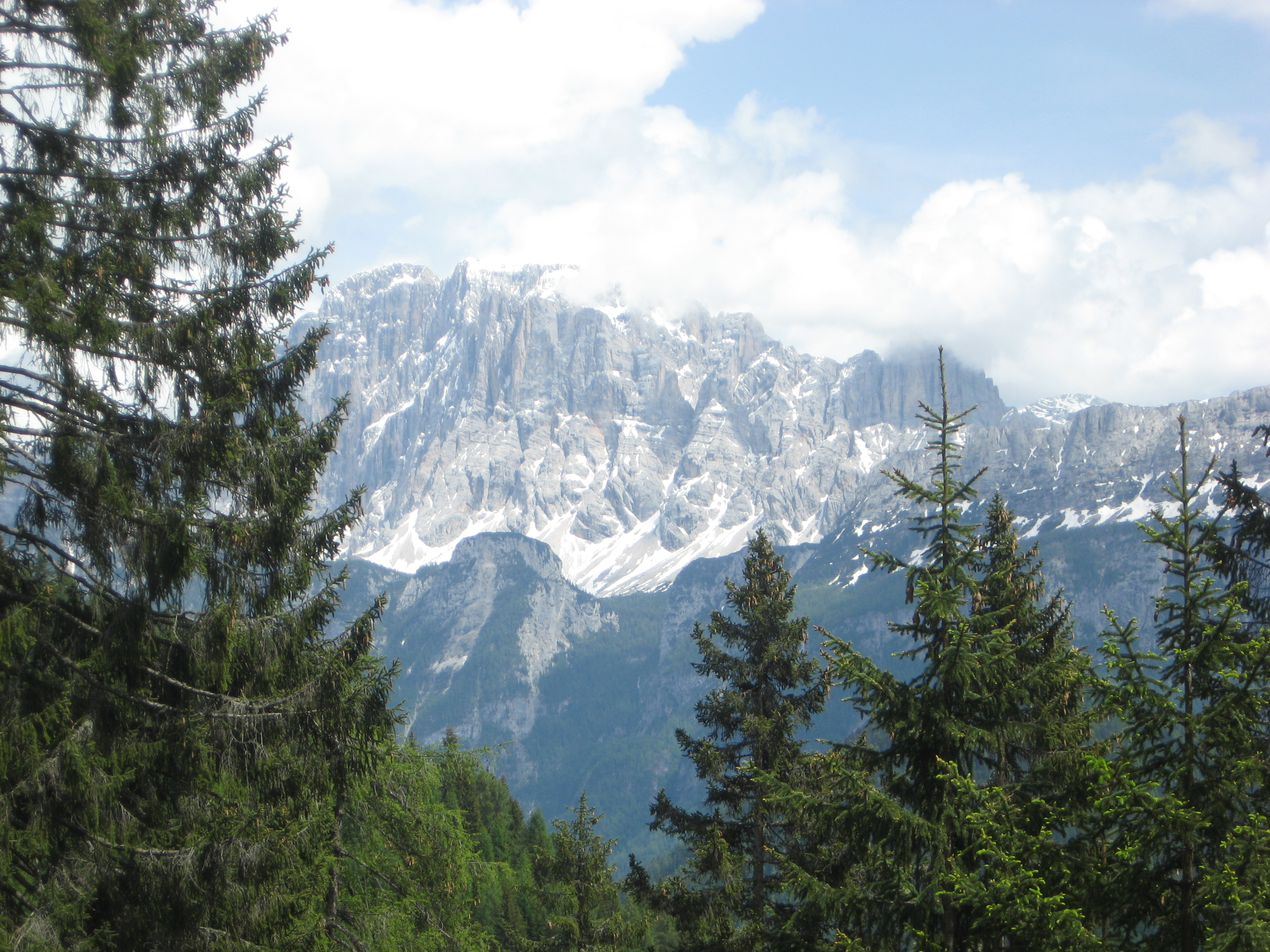 Monte Civetta visto dalla baita Col Mont, sull'alta via dei pastori